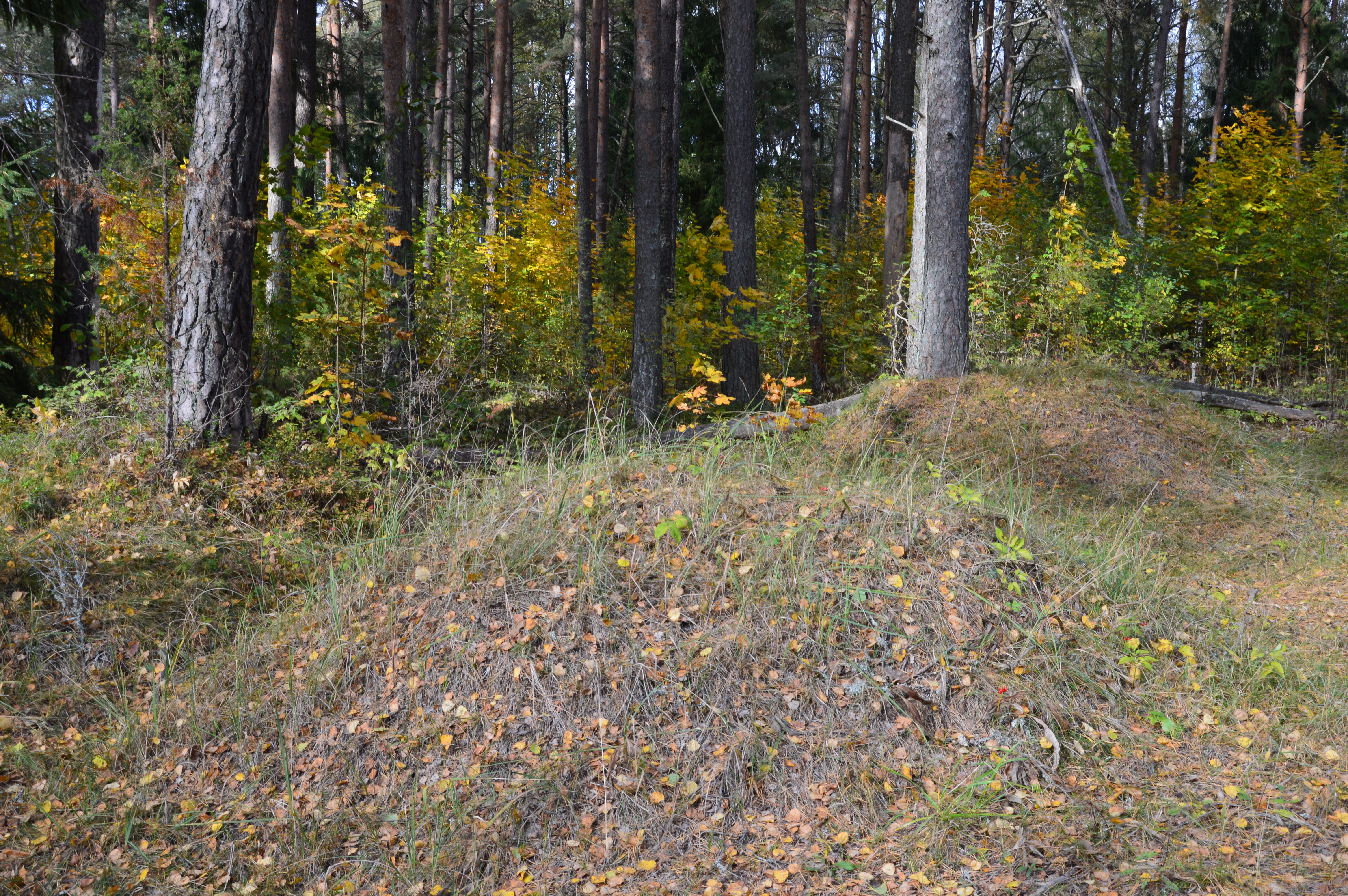 Mõned kääpad Jõuga kääbaskalmistul.